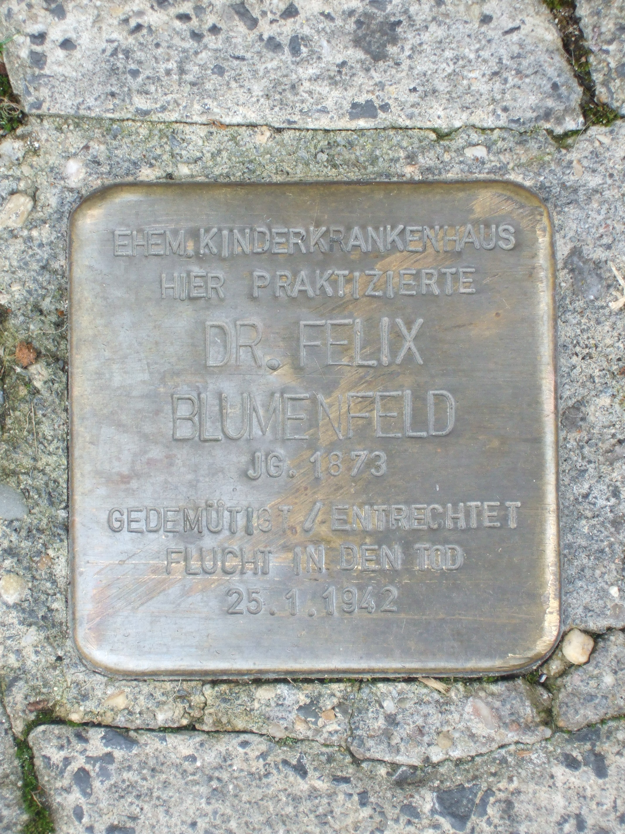 Stolperstein Felix Blumenfeld